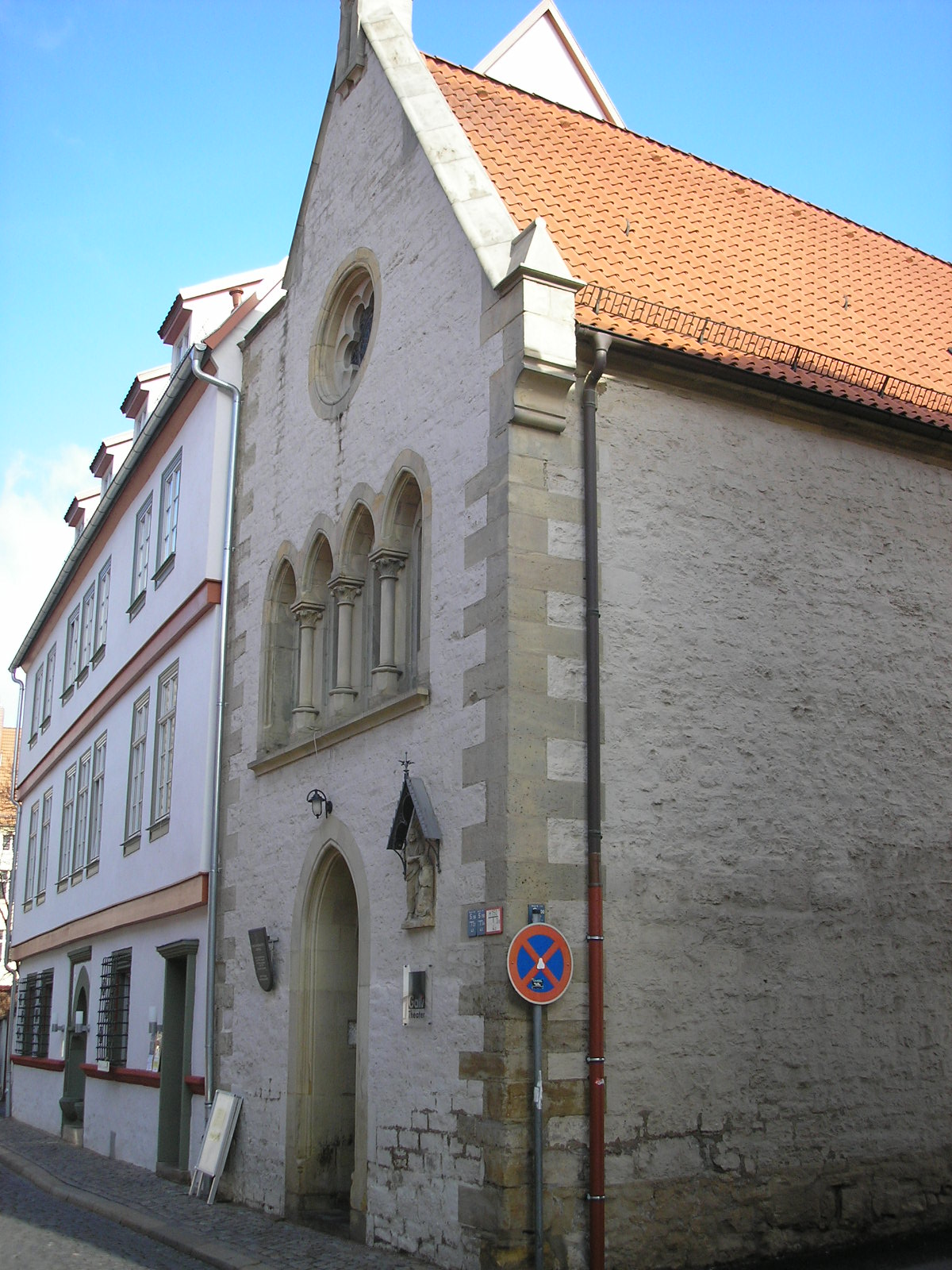 Die Fassade der Magdalenenkapelle in Erfurt (Thüringen).